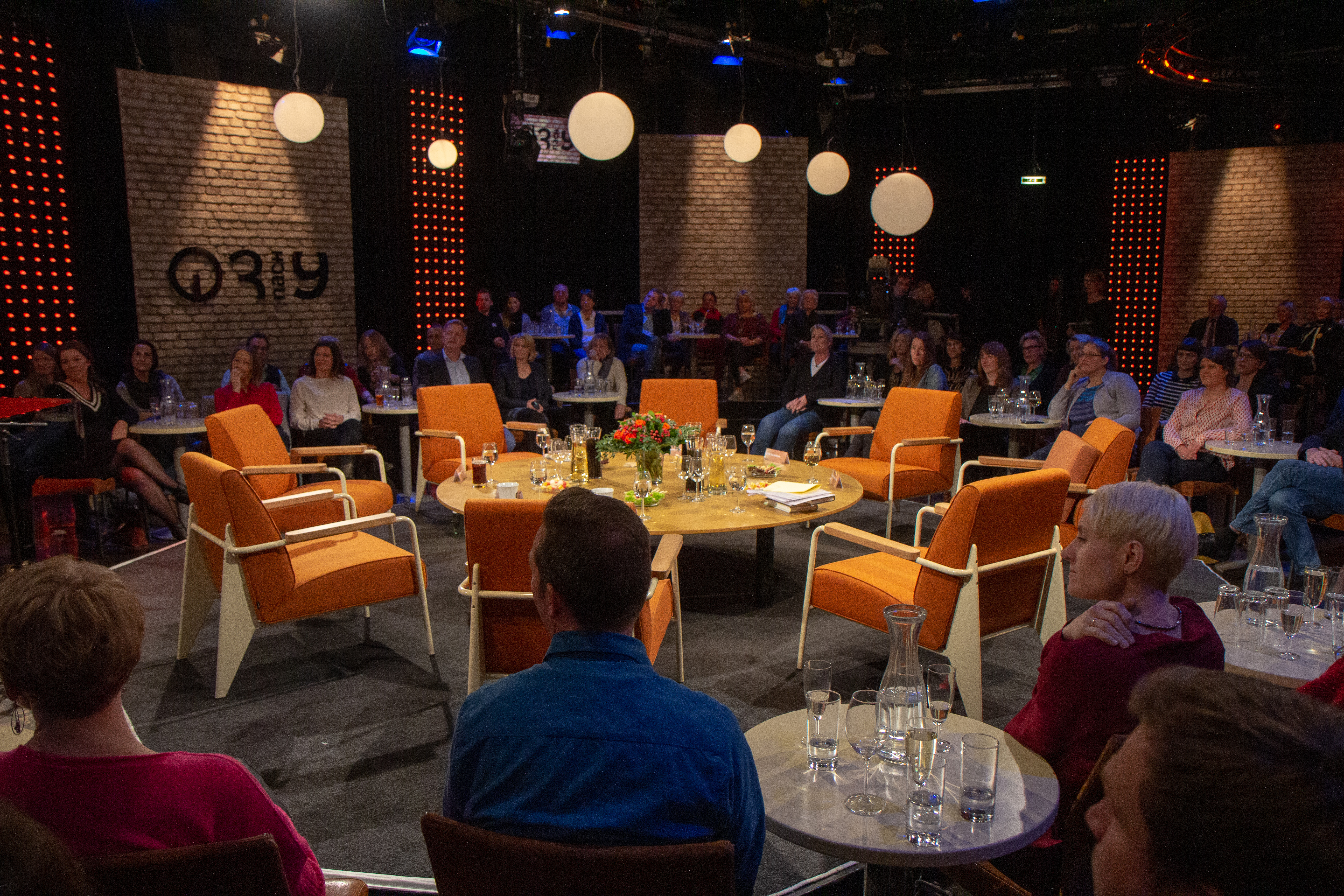 Sendung 3 nach 9 am 23. November 2018 in Bremen